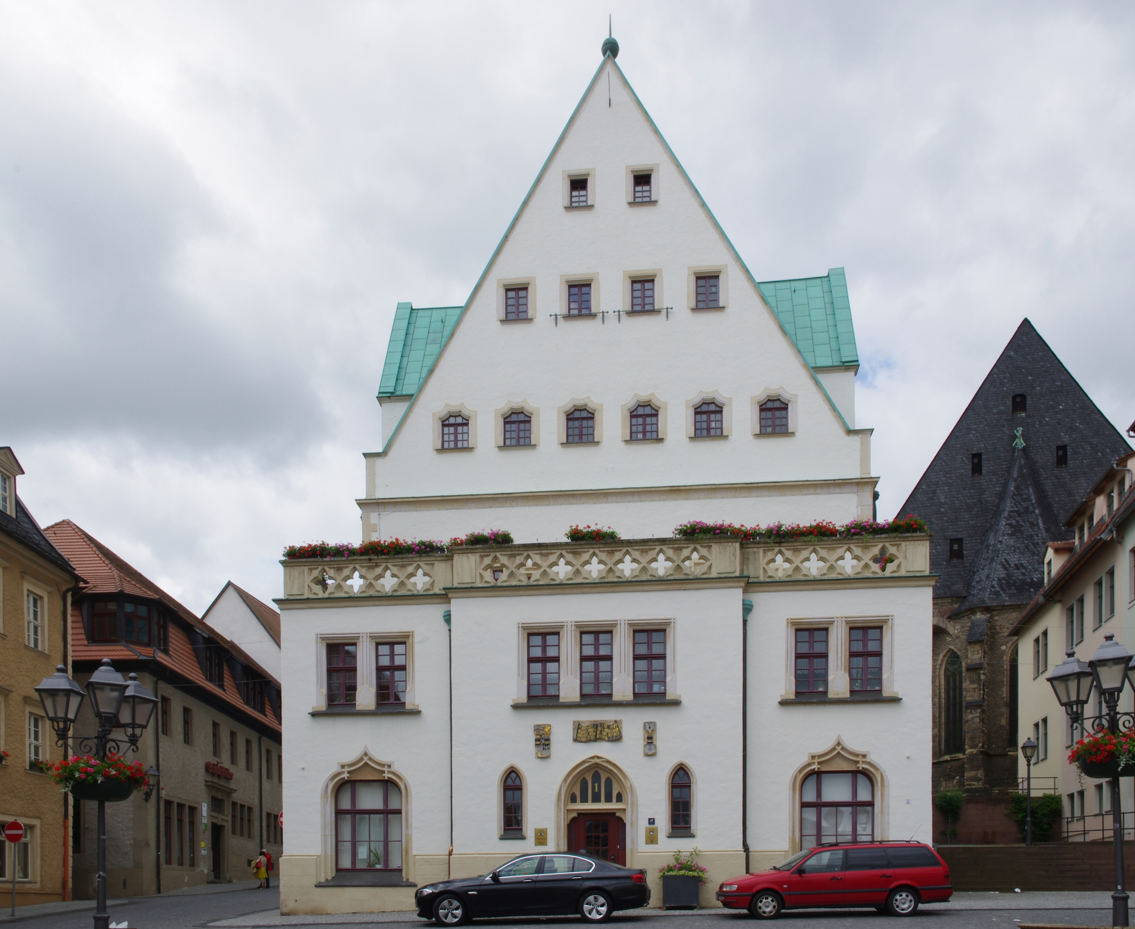 Lutherstadt Eisleben. Das Rathaus am Markt steht unter Denkmalschutz.